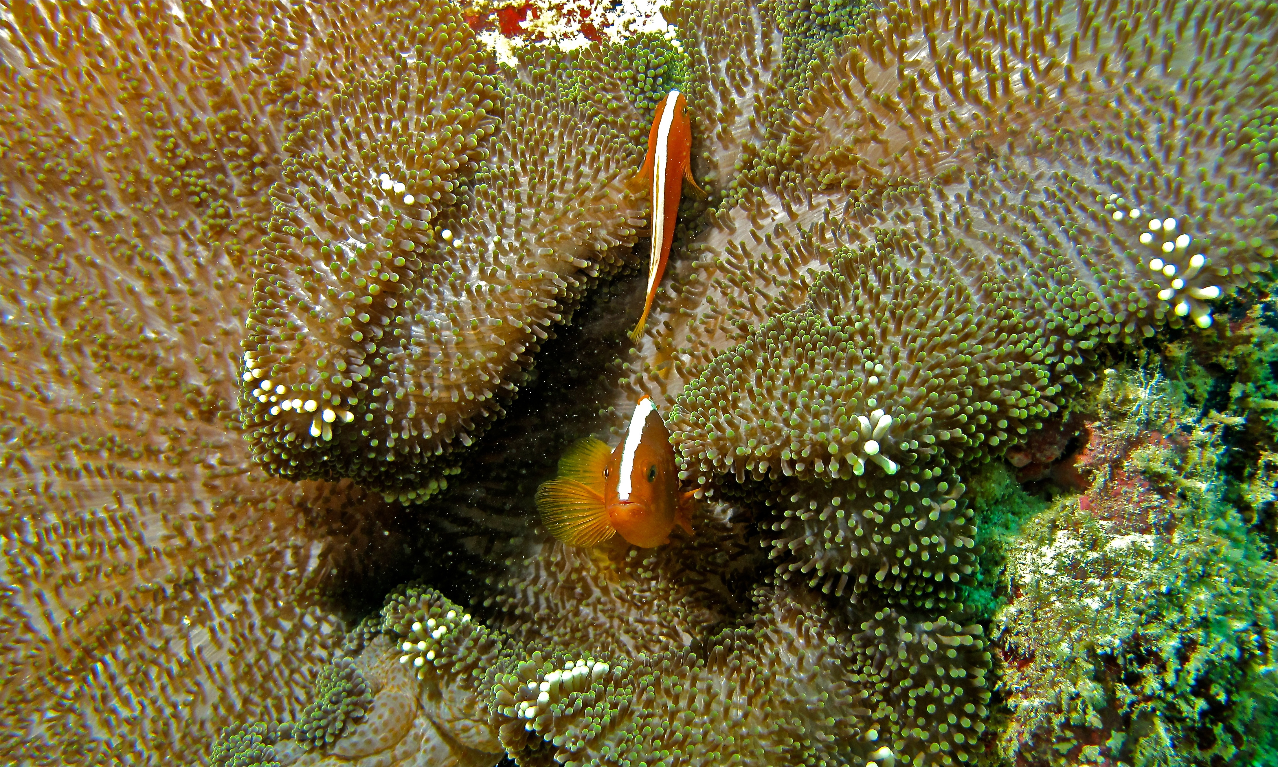 Lobster Wall, Pulau Mabul, Sabah, MALAYSIA